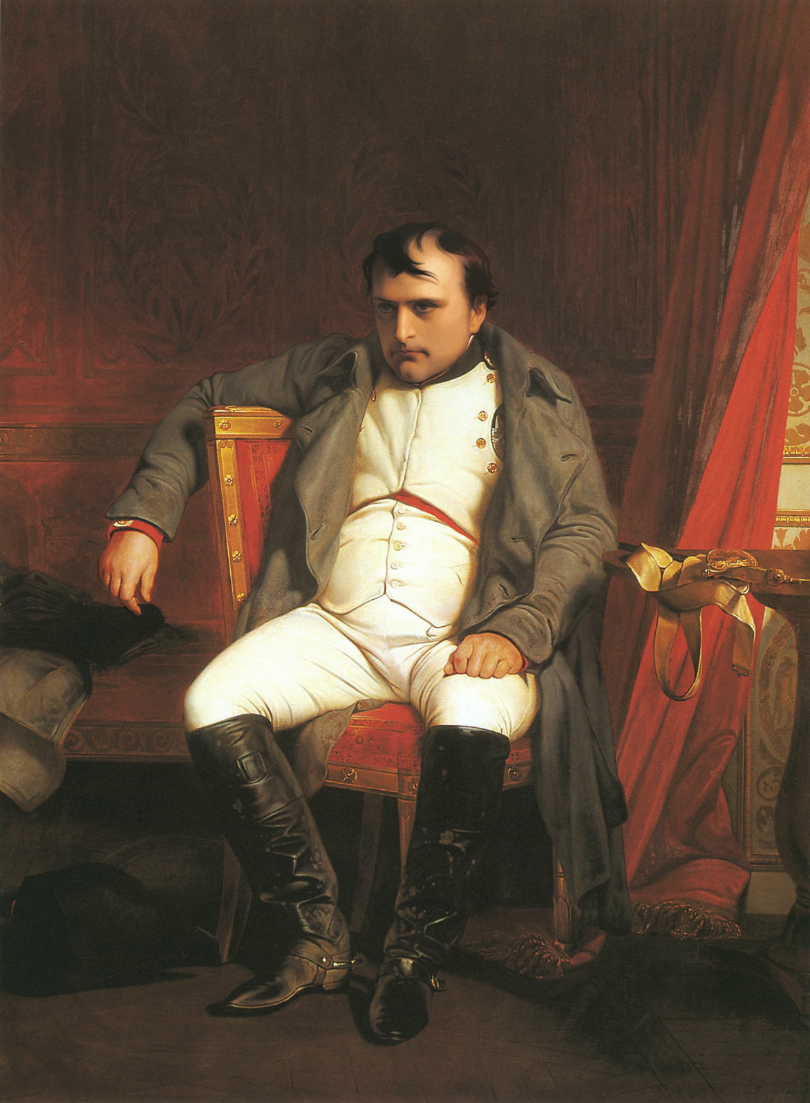 Paul Delaroche, Napoléon à Fontainebleau, 1840 Paris Musée de l'armée